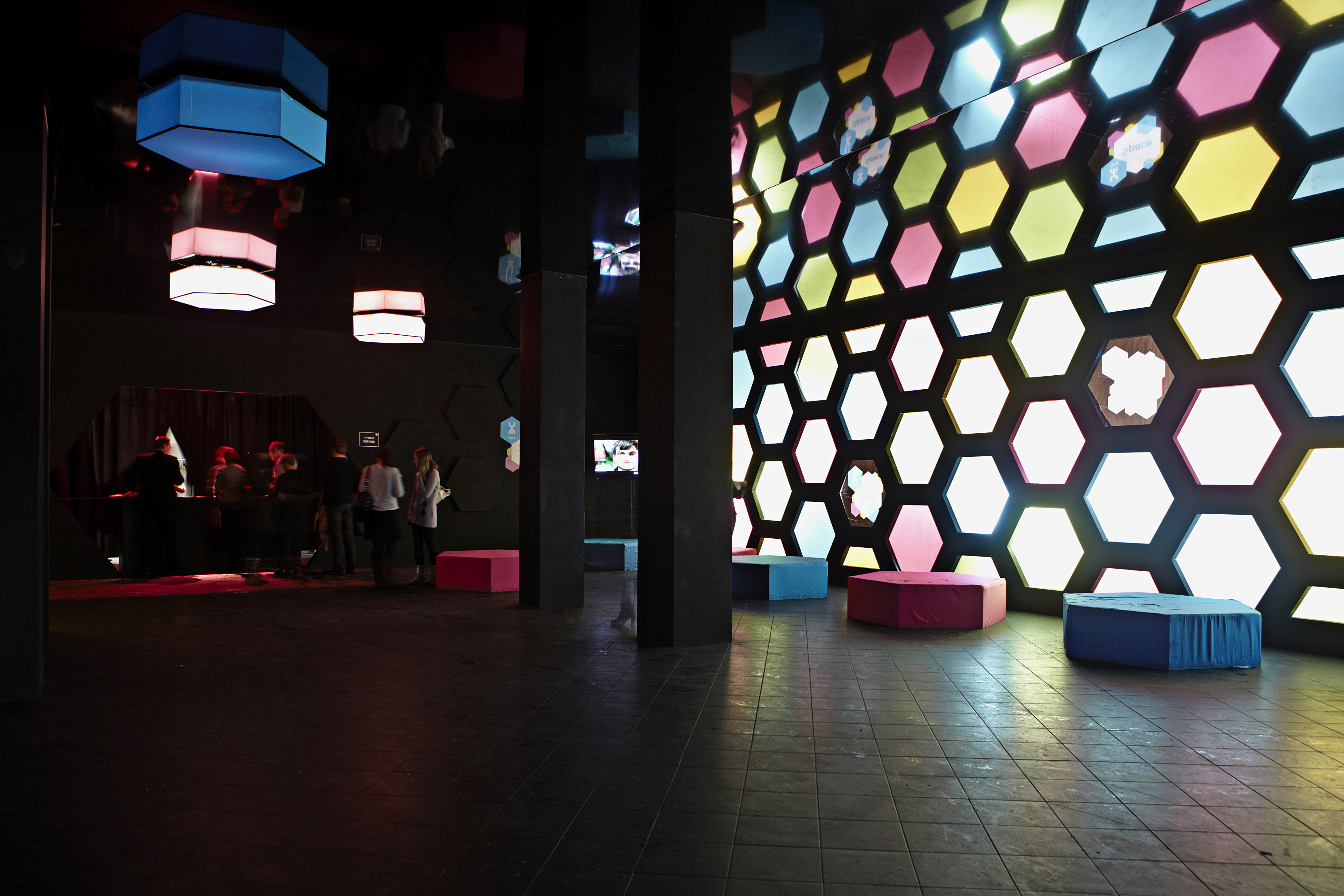 Yota Space 2010. Холл первого этажа